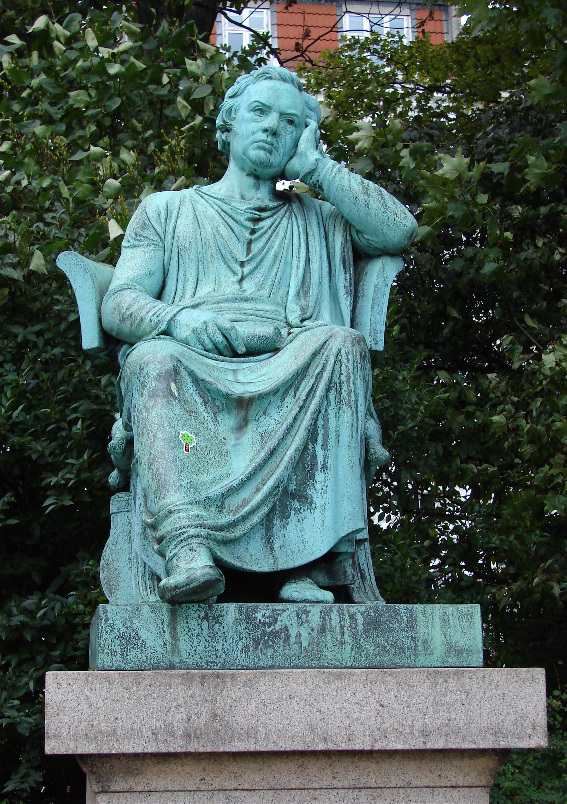 Anders Sandøe Ørsted, Vilhelm Bissen efter model af Herman Wilhelm Bissen, opstillet 1902, H.C. Ørstedsparken, København